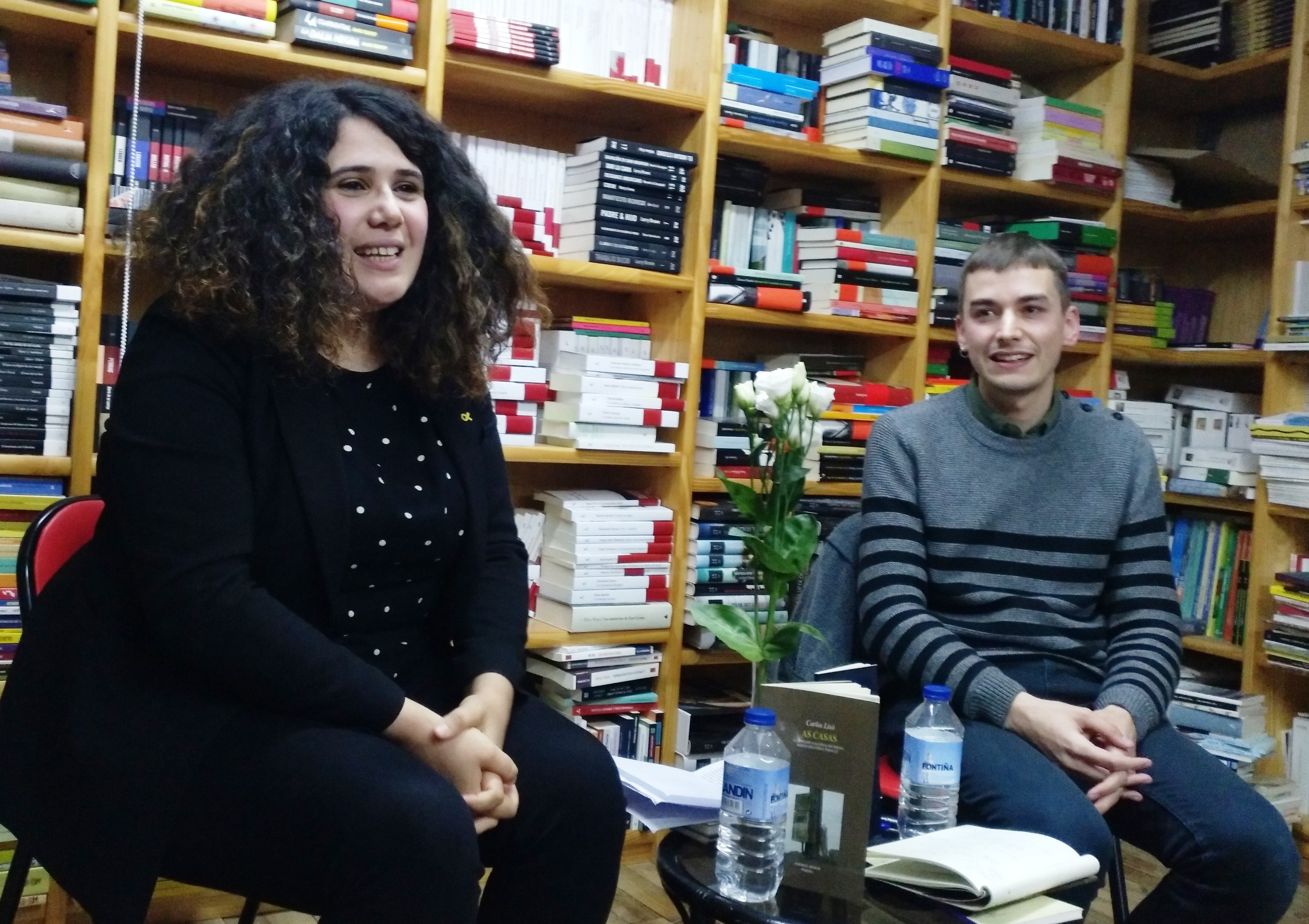 Oriana Méndez e Carlos Lixó en "Teñamos a poesía en paz". Libraría Paz de Pontevedra. 11/04/2019